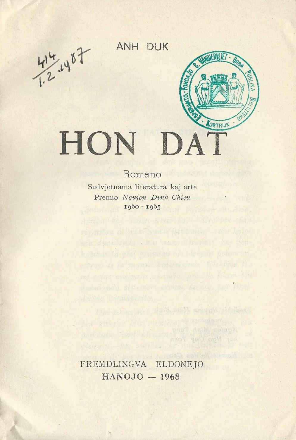 librokovrilo de libro "Hon Dat", 1968